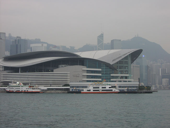 香港會議展覽中心，自行拍攝 (2004.2)